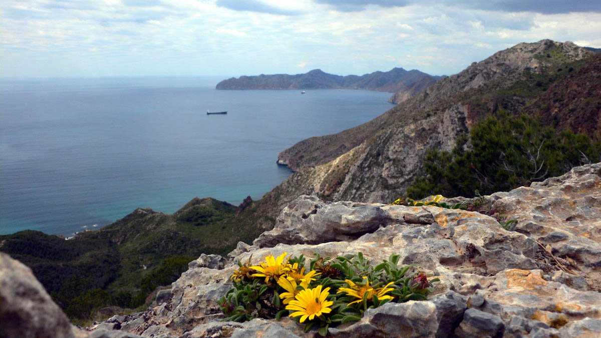 Asteriscus maritimus en el Collado Roldán. Parque natural de la Sierra de la Muela en Cartagena (España)